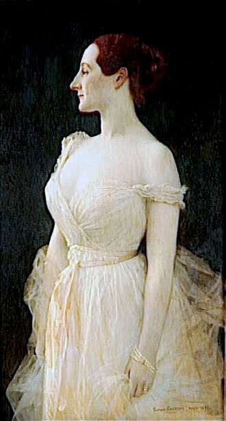 Portrait de Madame Gautreau. 1891